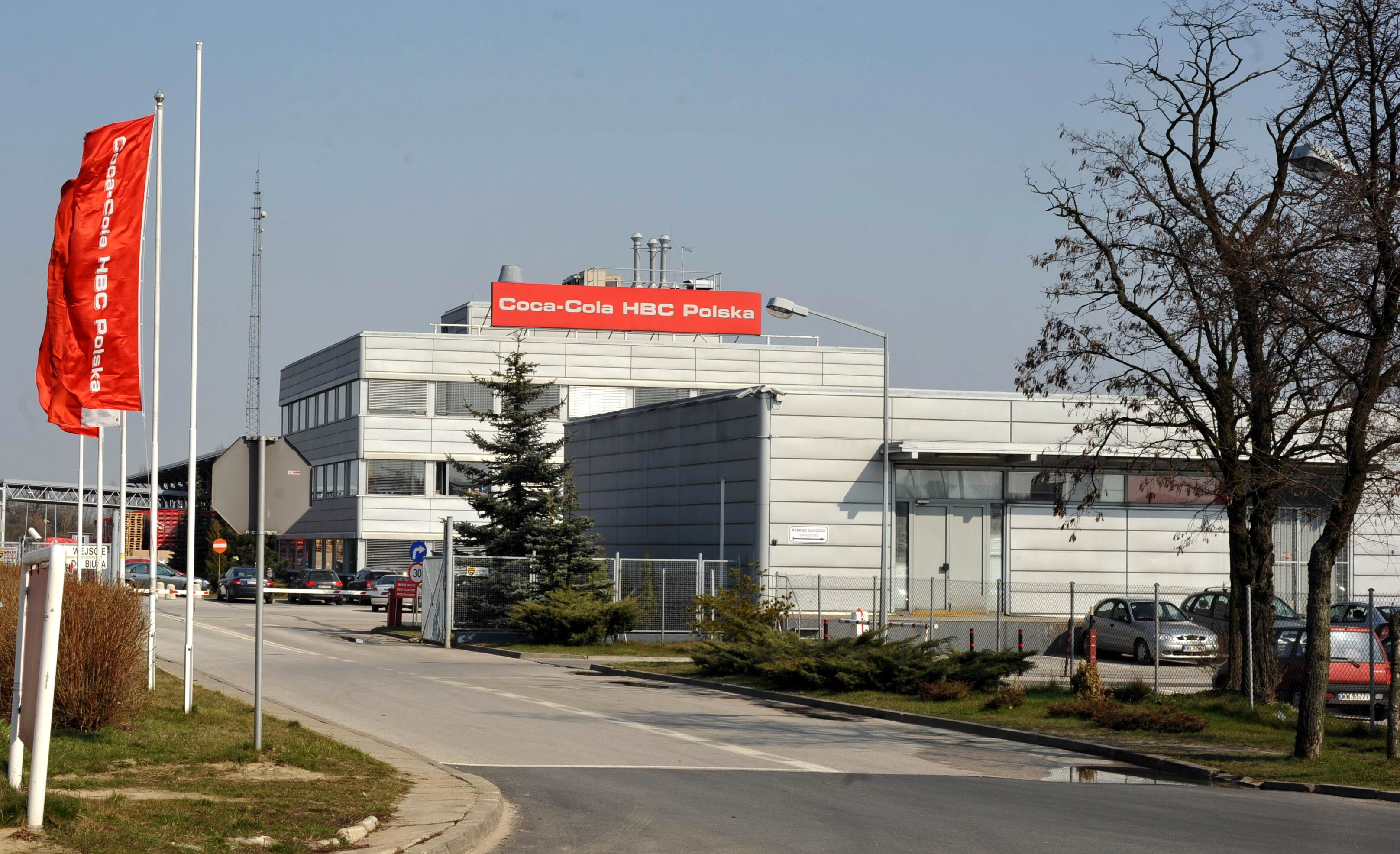 Centrala Coca-Cola w Warszawie, ul. Annopol 20